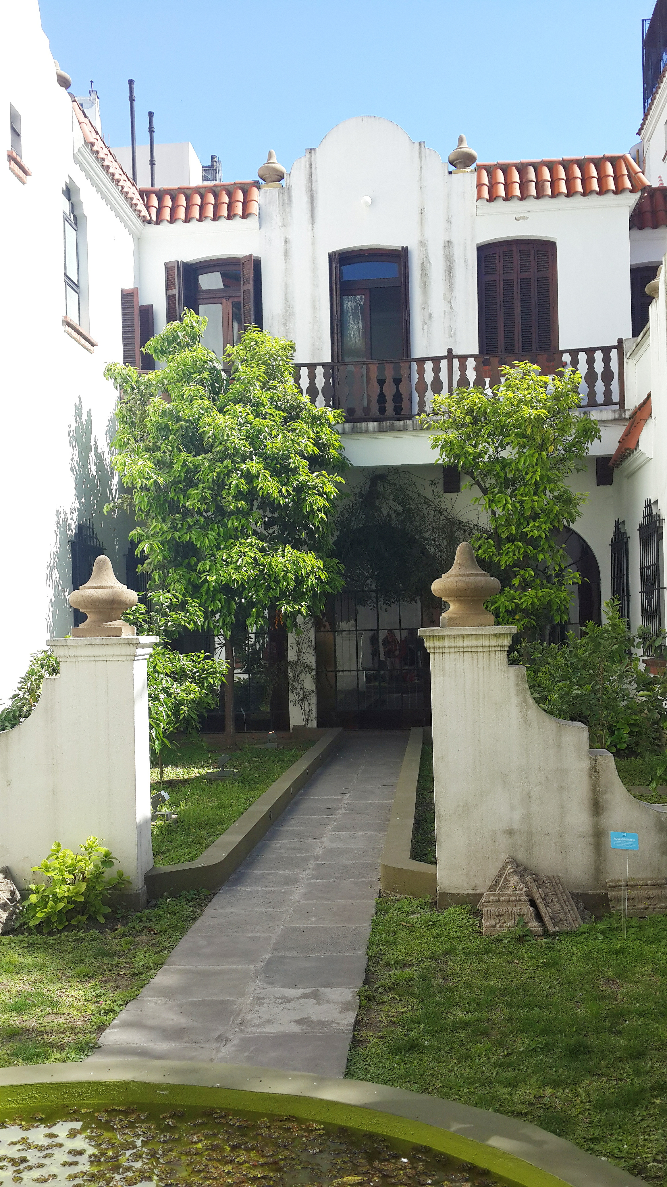 foto tomada en el museo de la casa de ricardo rojas